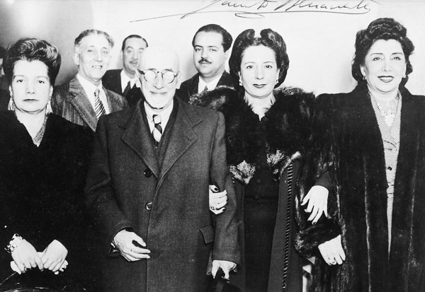 В центре Дон Хасинто Бенавенте, лауреат Нобелевской премии, на именинах Пакиты в 1945 году. Справа от него Пакита Мас и Лола Мембривес